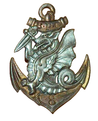 Insigne du 8° BPC